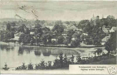 Гологори Панорама. Селище біля Злочіва (Тернопільського воєводства)